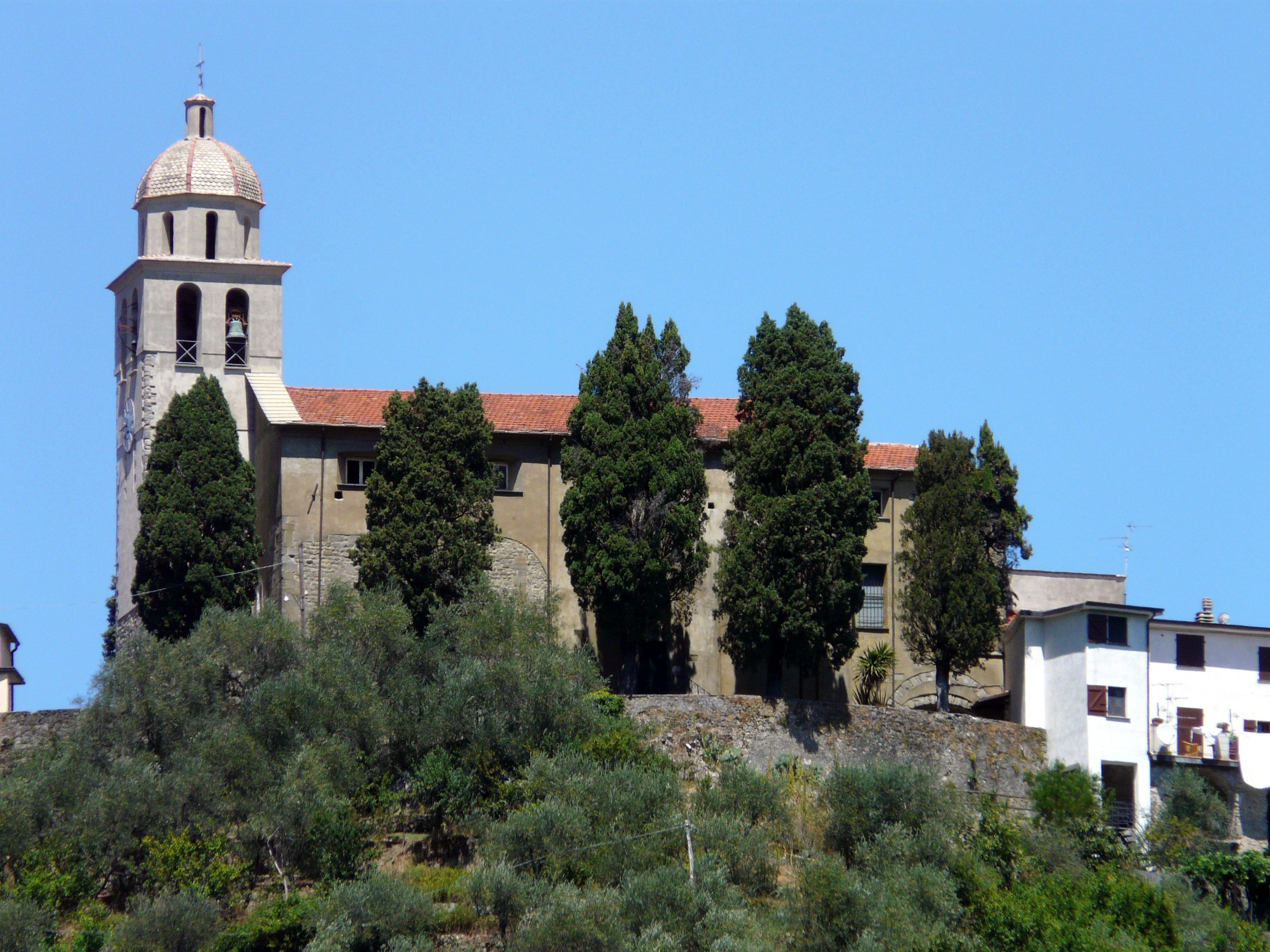 La chiesa di San Michele Arcangelo, Cassana, Borghetto di Vara, Liguria, Italia